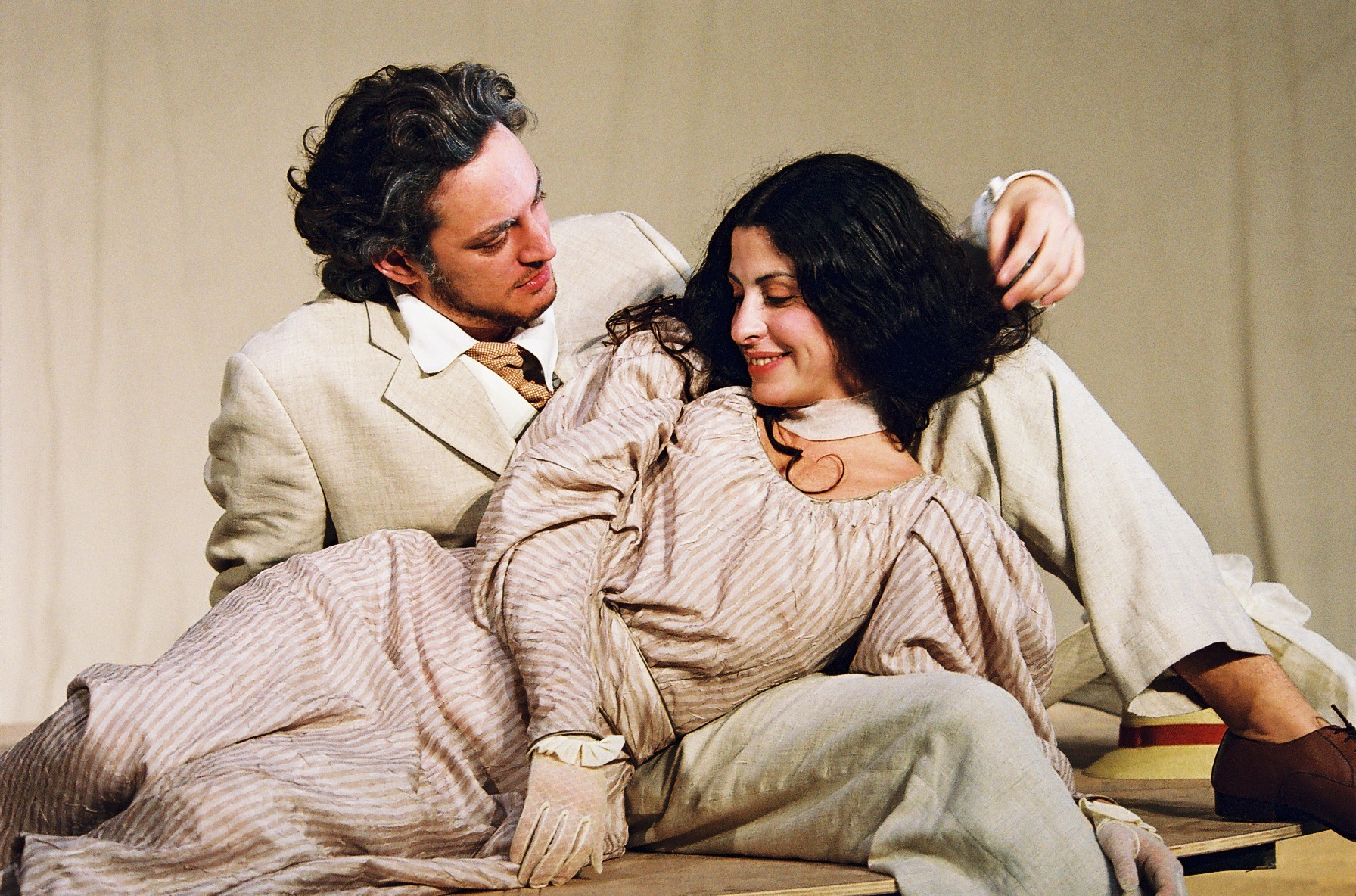 בשני קולות-אפרת בן צור ויחזקאל לזרוב - 2004